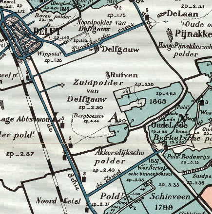 Zuidpolder_Delfgauw_en_Akkerdijkse_polder